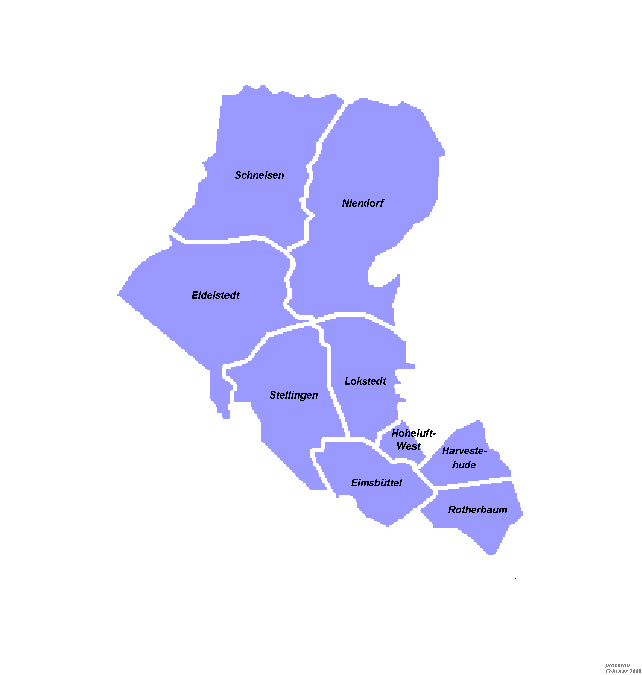 Stadtteile im Bezirk Eimsbüttel in Hamburg.